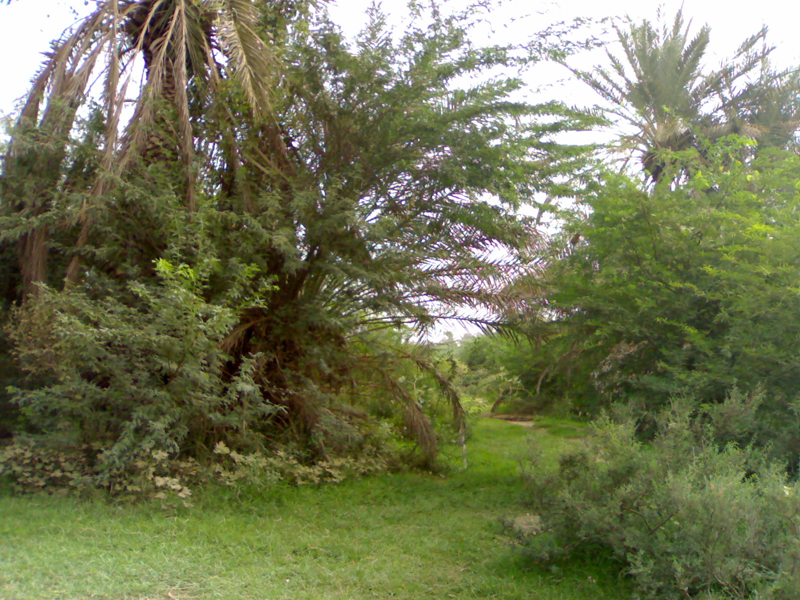 منتزه وادي الدحن الواقع بمركز الخشل التابع لمحافظة الحرث جنوب منطقة جازان